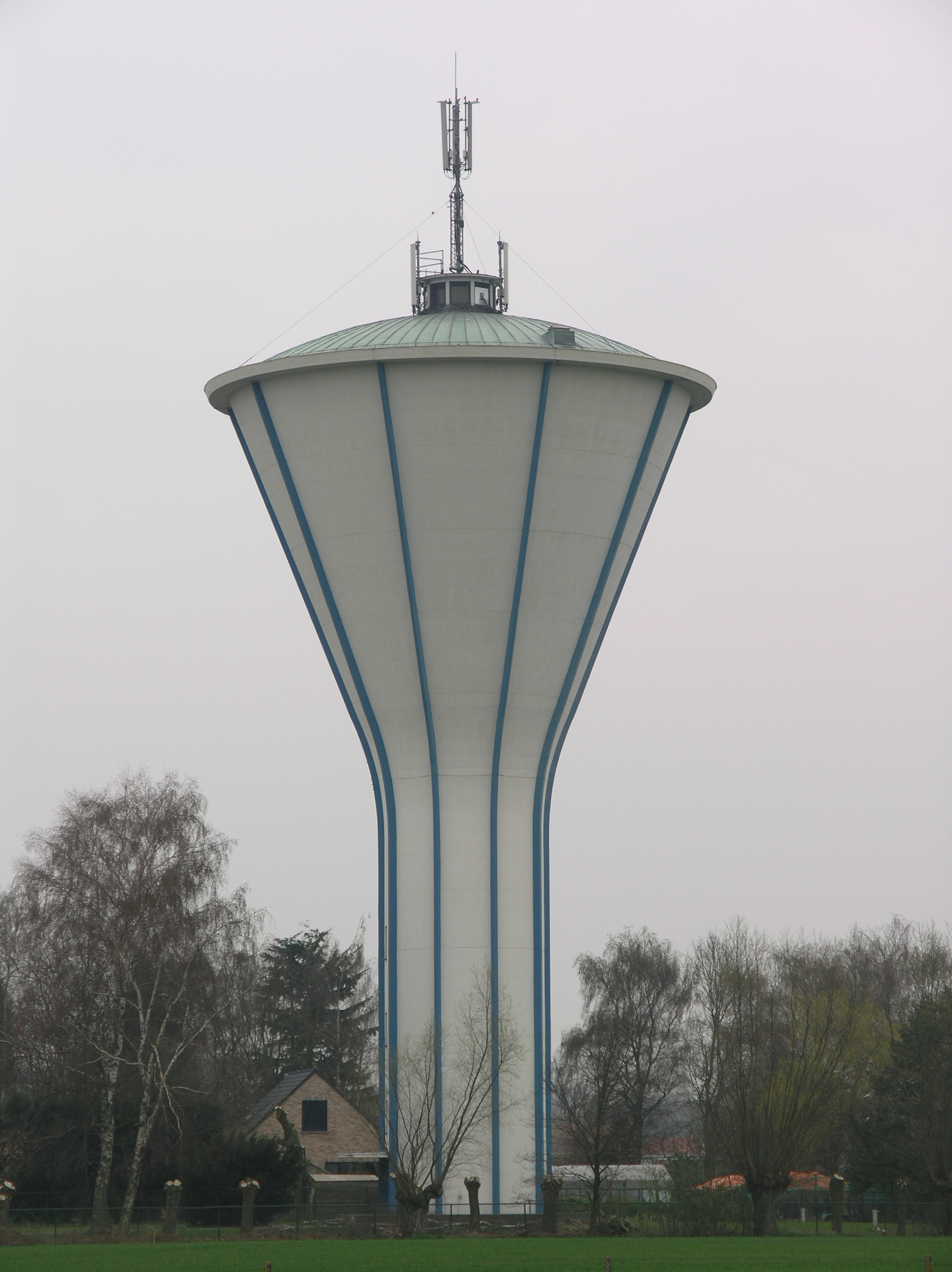 Essen Oude Baan Watertoren